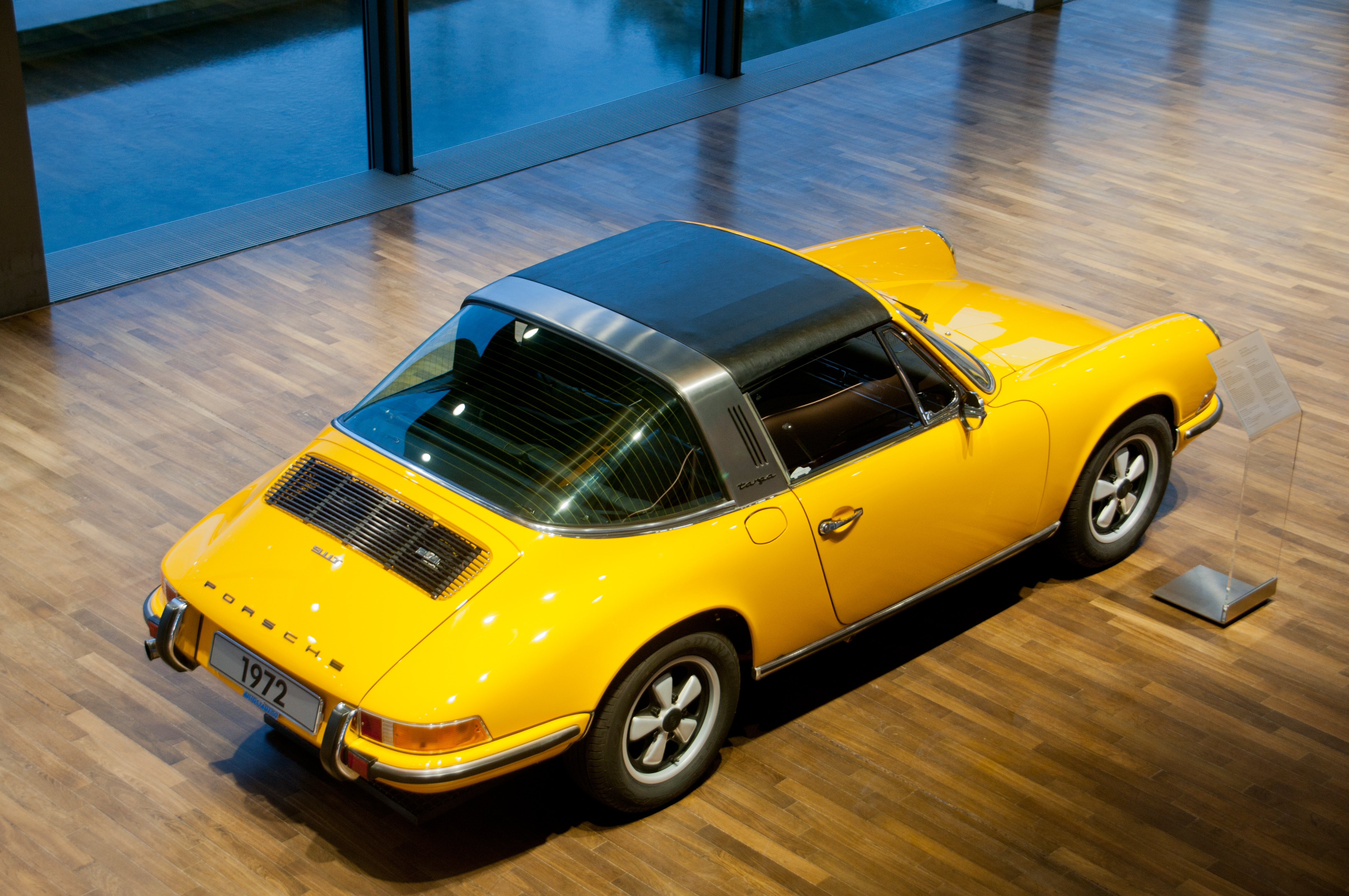 Autostadt Wolfsburg